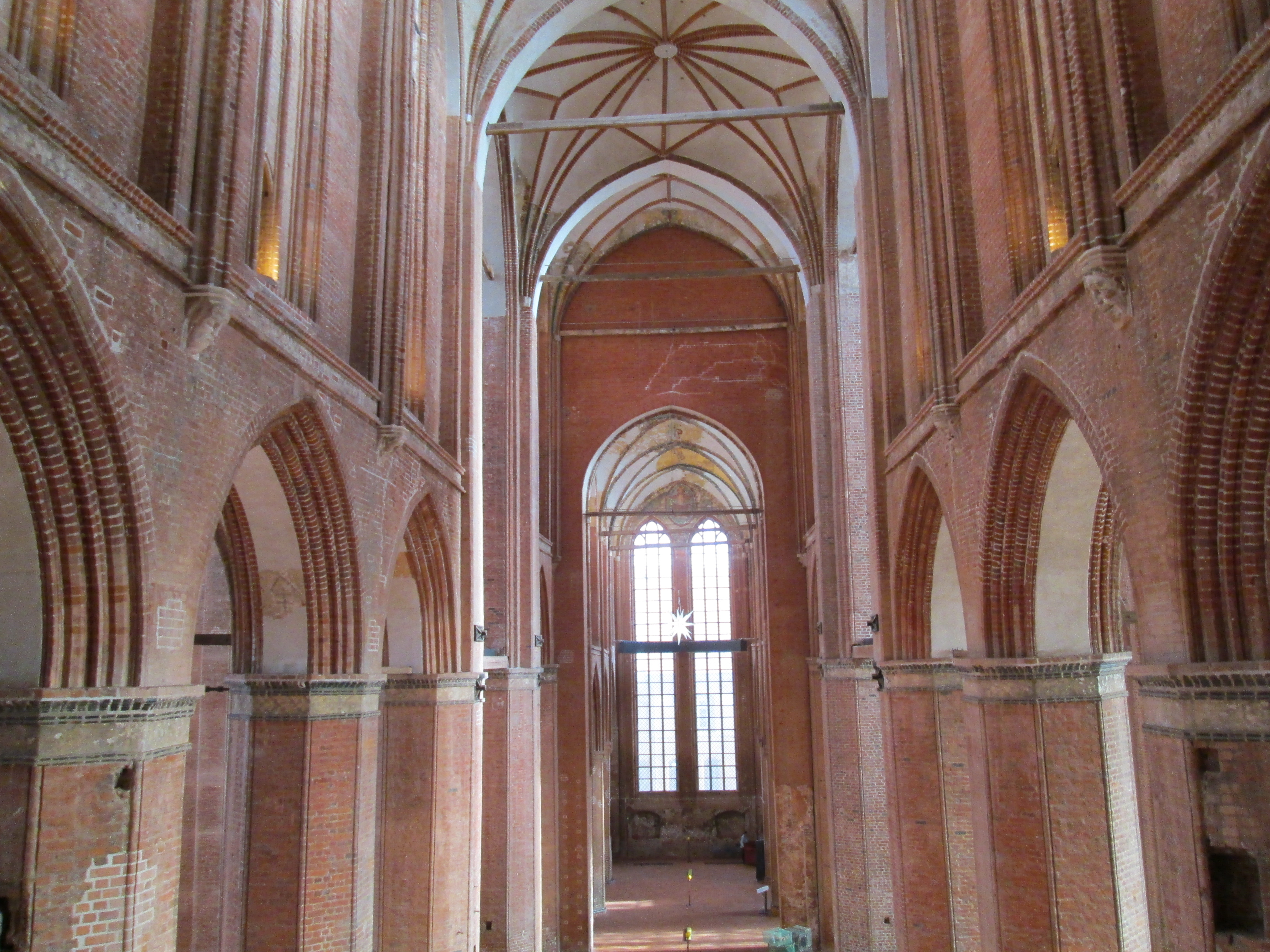 Innenraum der St. Georgenkirche Wismar (2017)